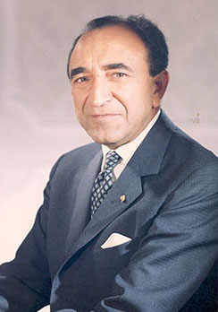 اسدالله علم، نخست وزیر سابق ایران